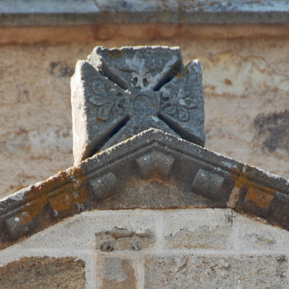 St.-Jean Glaine-Montaigut, Tatzenkreuz auf Chorfirst